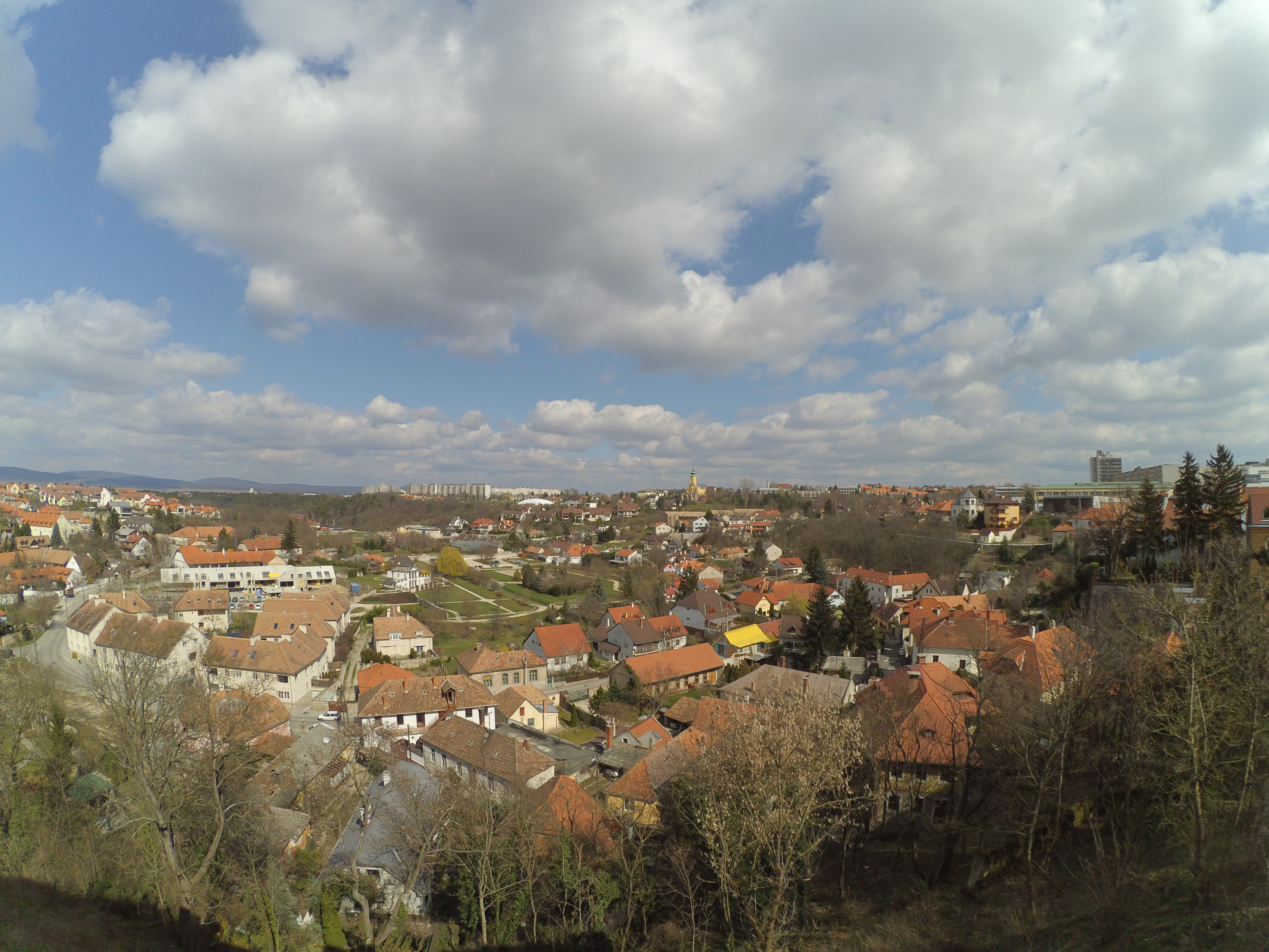 Veszprémi panoráma a várból